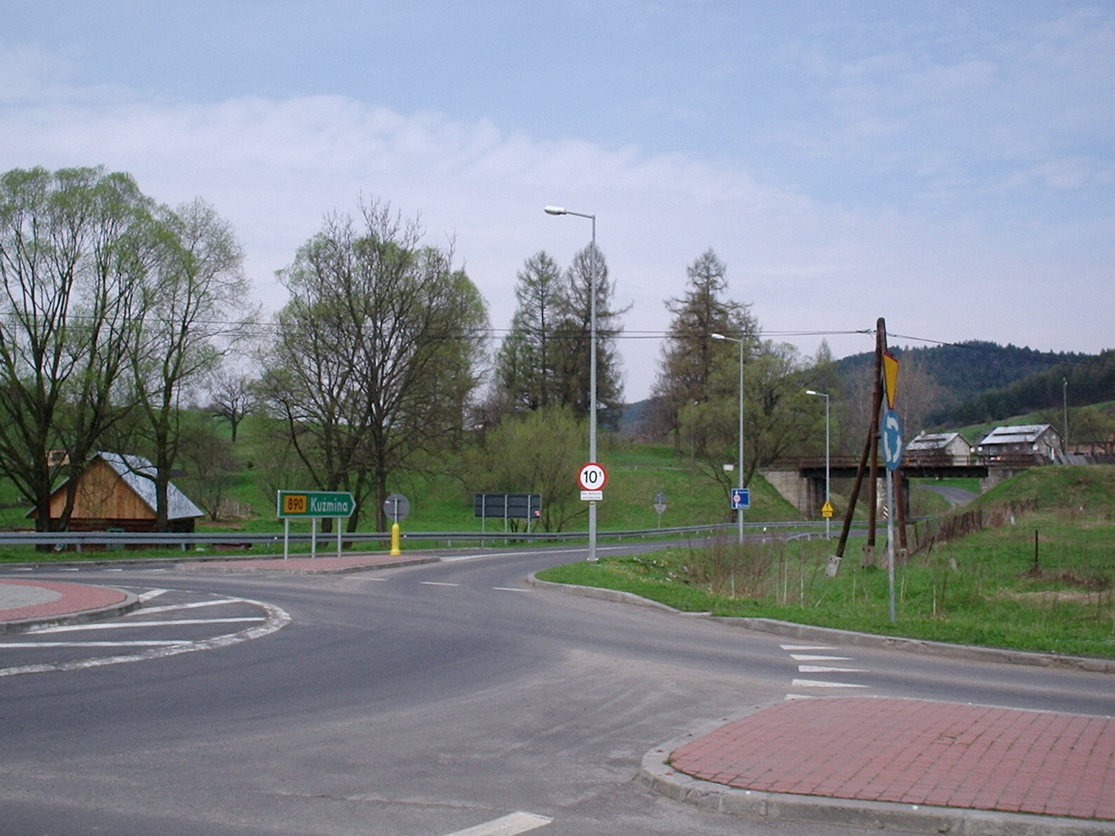 Krościenko n/Strwiążem, rondo, za wiaduktem kolejowym d. Obersdorf, na prawo dojazd go granicy państwowej, Autor zdjęcia : Marek Silarski